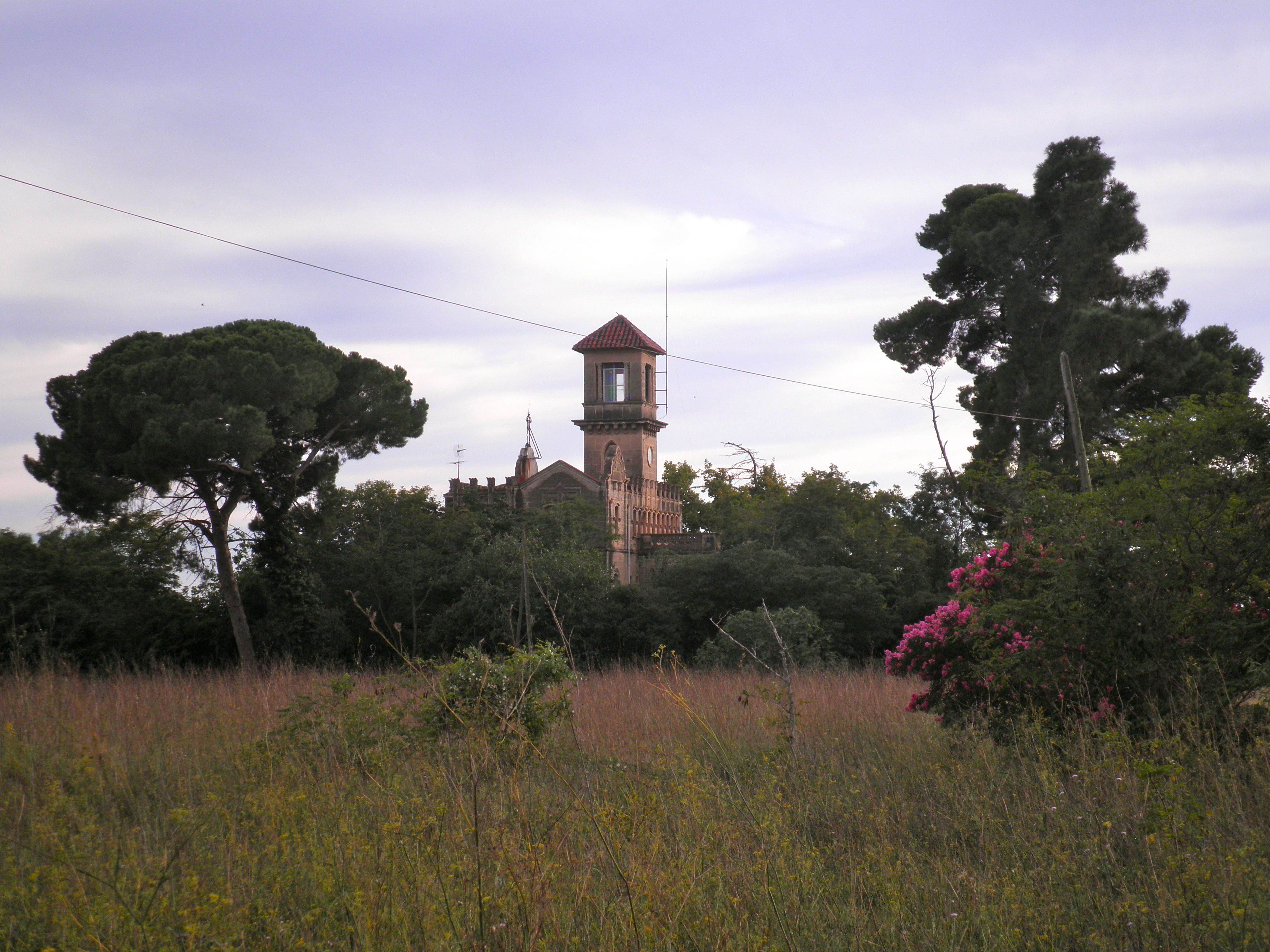 Aspecte actual del Mas de Vil·la Maria, al terme de Reus